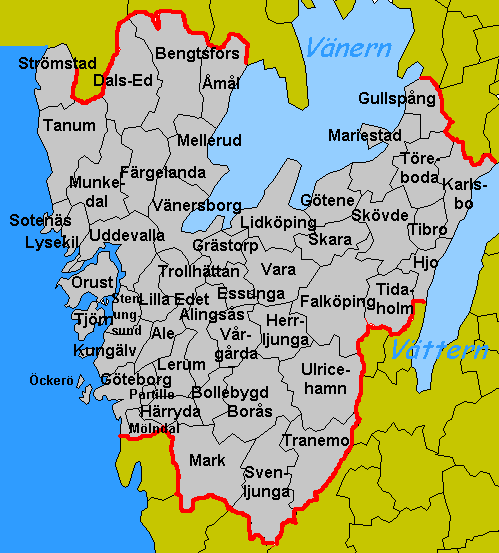 Västra Götaland County in Sweden